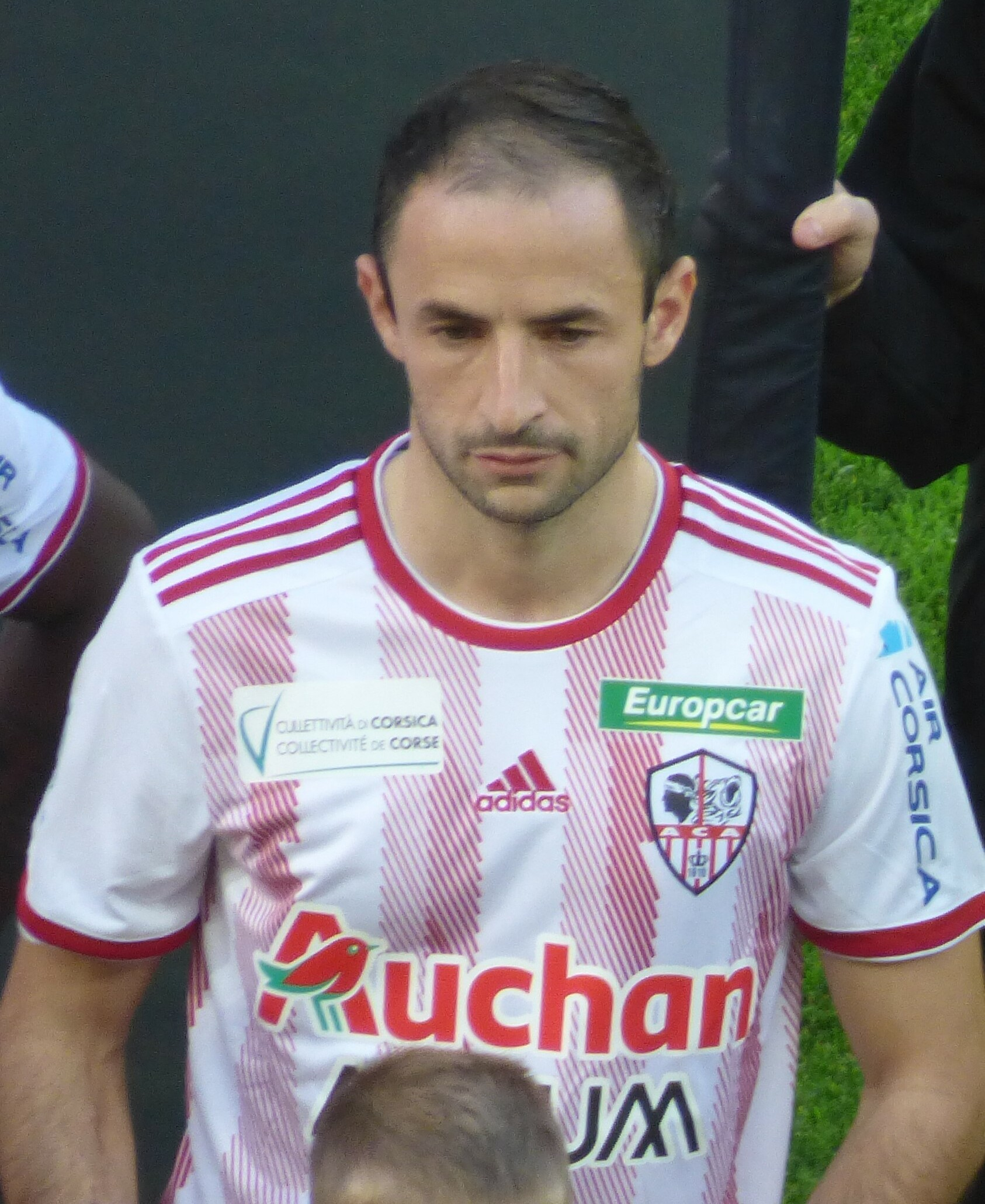 Jérôme Hergault avant le match RC Lens - AC Ajaccio, comptant pour la dix-neuvième journée du championnat de France de Ligue 2 2018-2019, le 22 décembre 2018, au Stade Bollaert-Delelis de Lens.